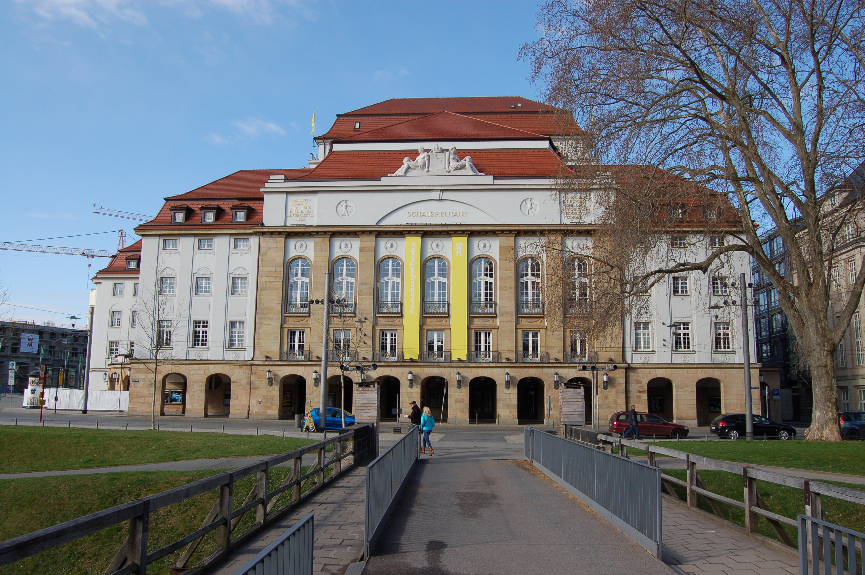 Das denkmalgeschützte Schauspielhaus in Dresden.